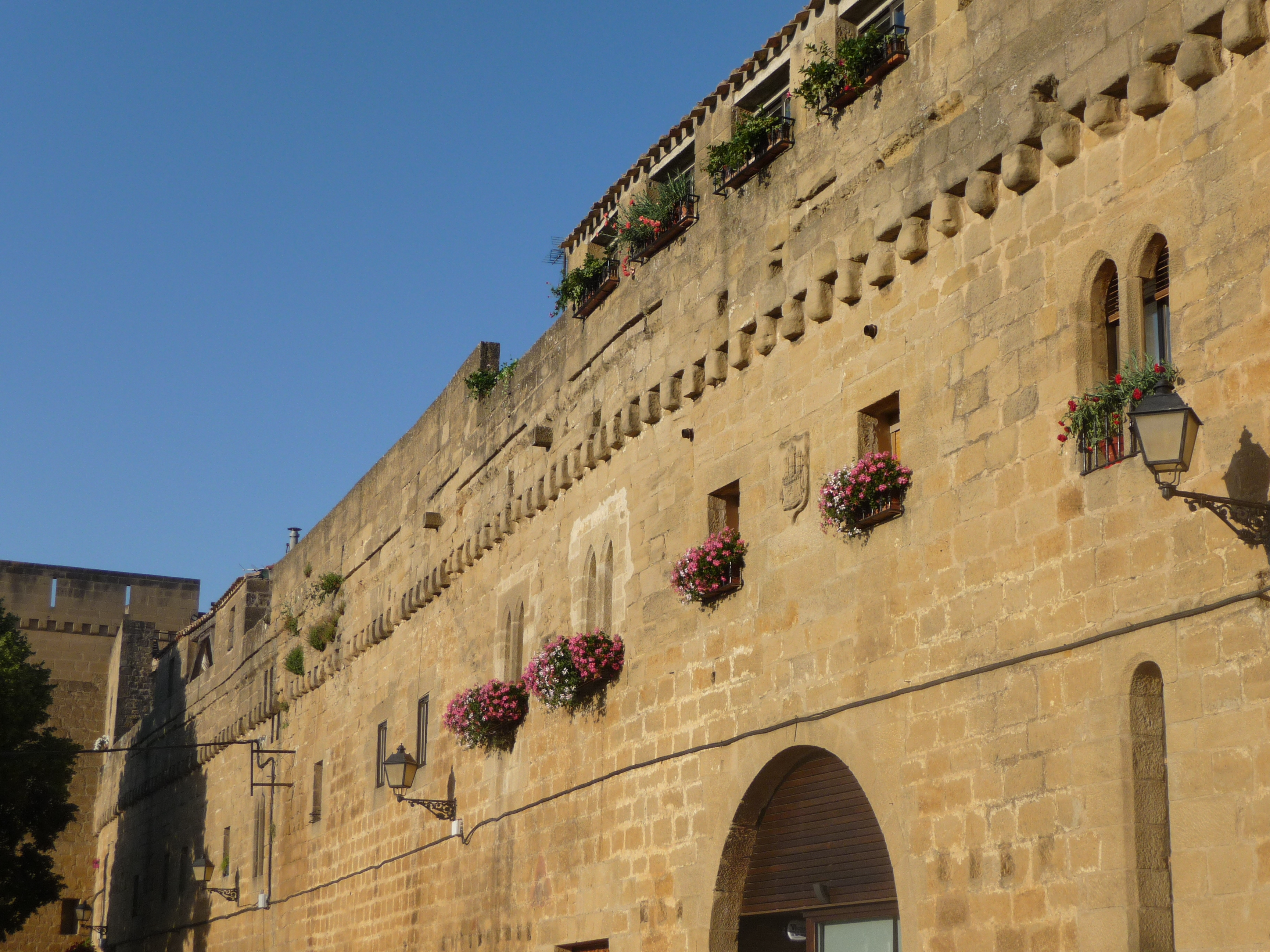 remparts